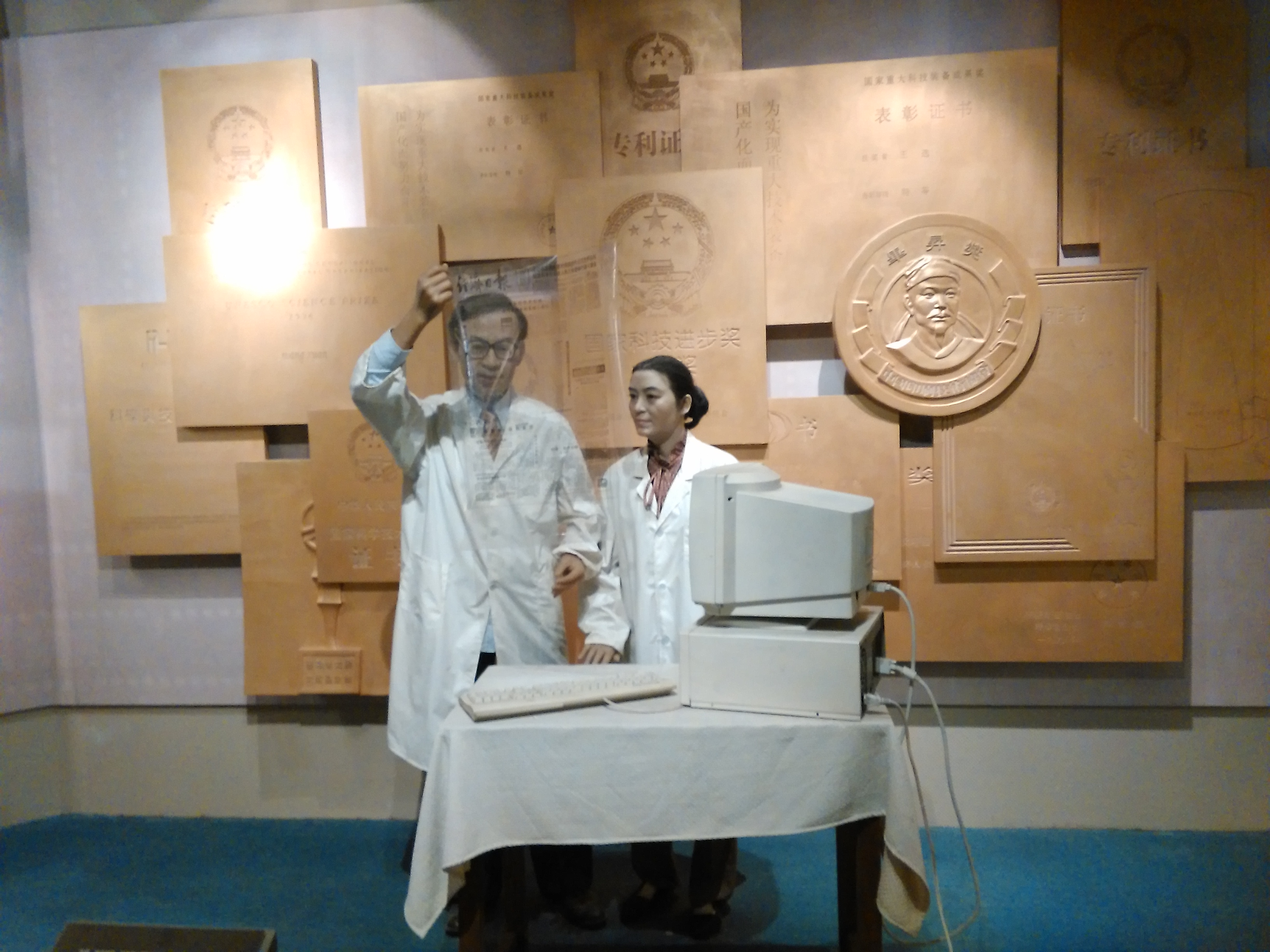 王选雕像，无锡博物馆